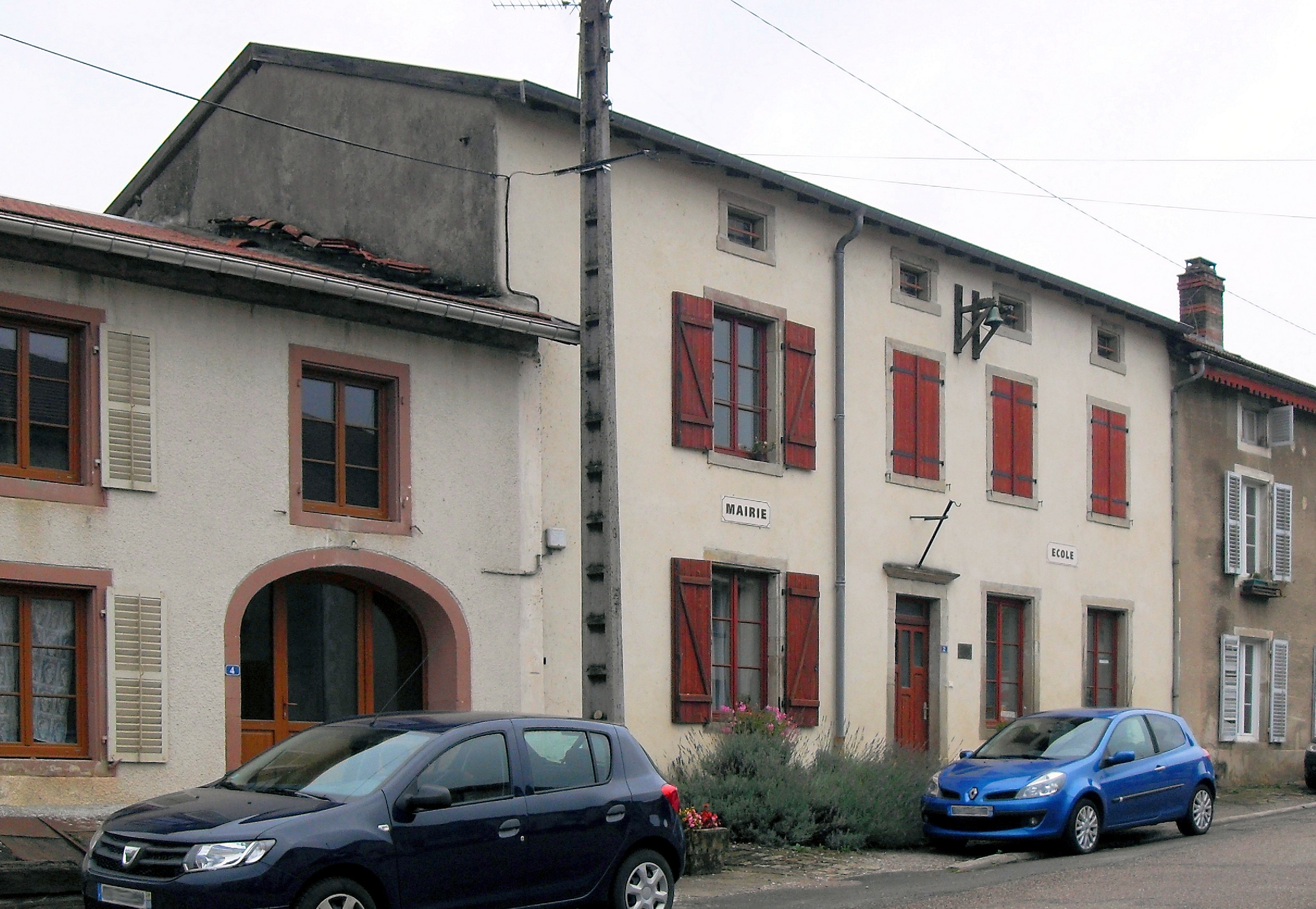 La mairie-école de Begnécourt